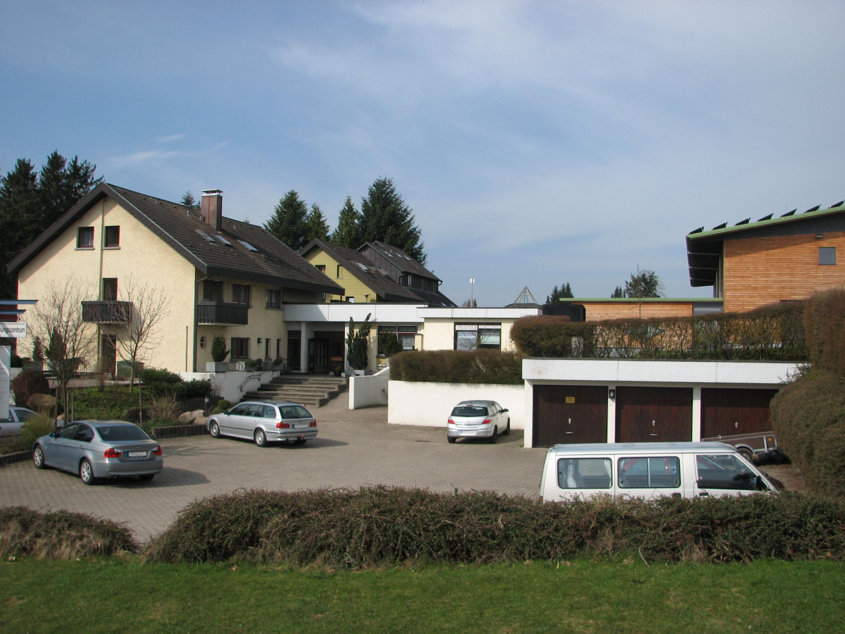 Das Bild zeigt das EC-Freizeit- und Schulungszentrum Dobel des Südwestdeutschen Jugendverbandes »Entschieden für Christus« (EC) e.V. vor der Außenrenovierung im Jahr 2008.